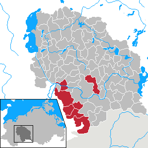 Amt Parchim-Land in Mecklenburg-Vorpommern - District Parchim